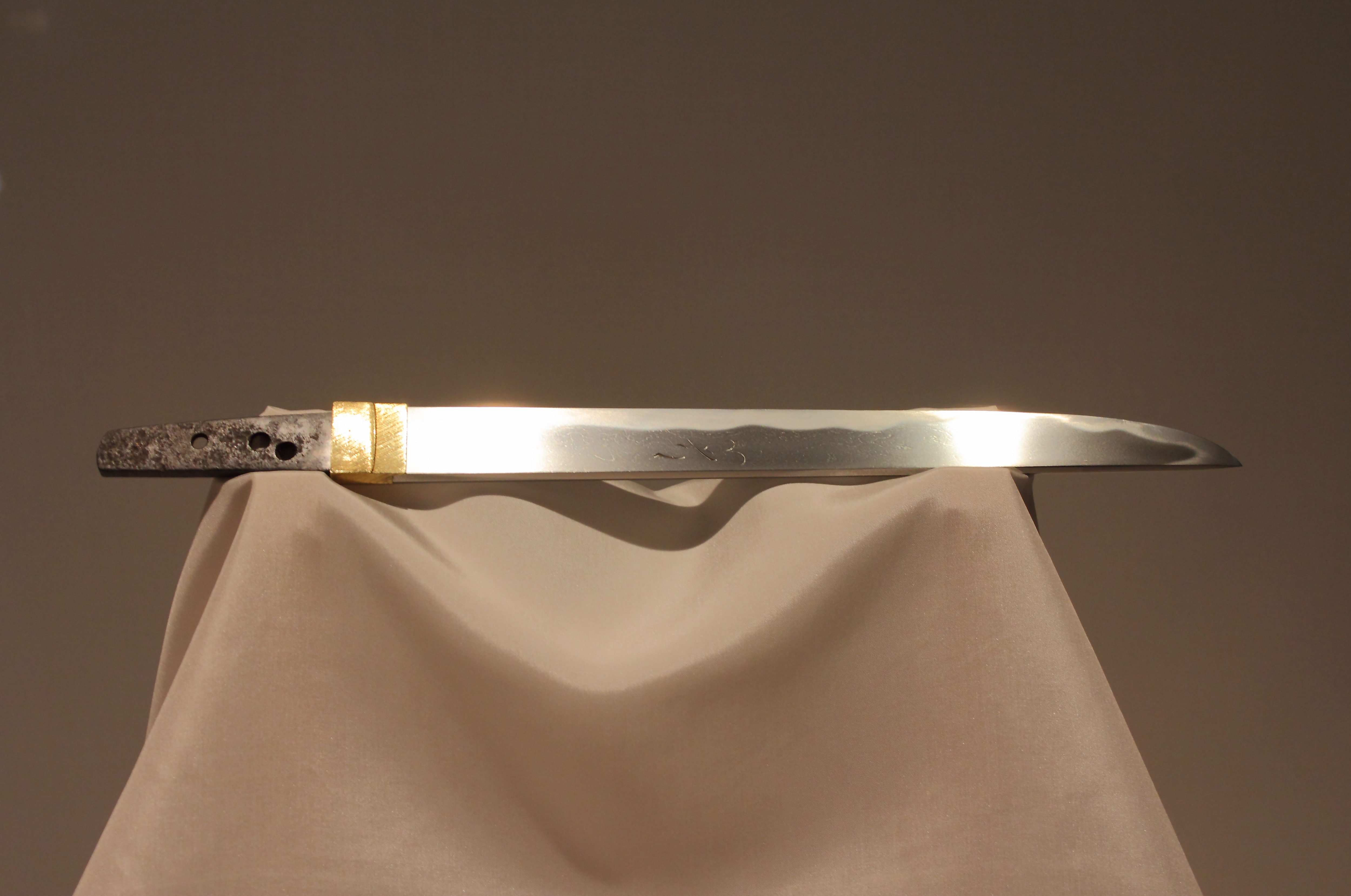 短刀 - 「無銘 正宗」相州正宗(重要美術品)、鎌倉時代。東京国立博物館。